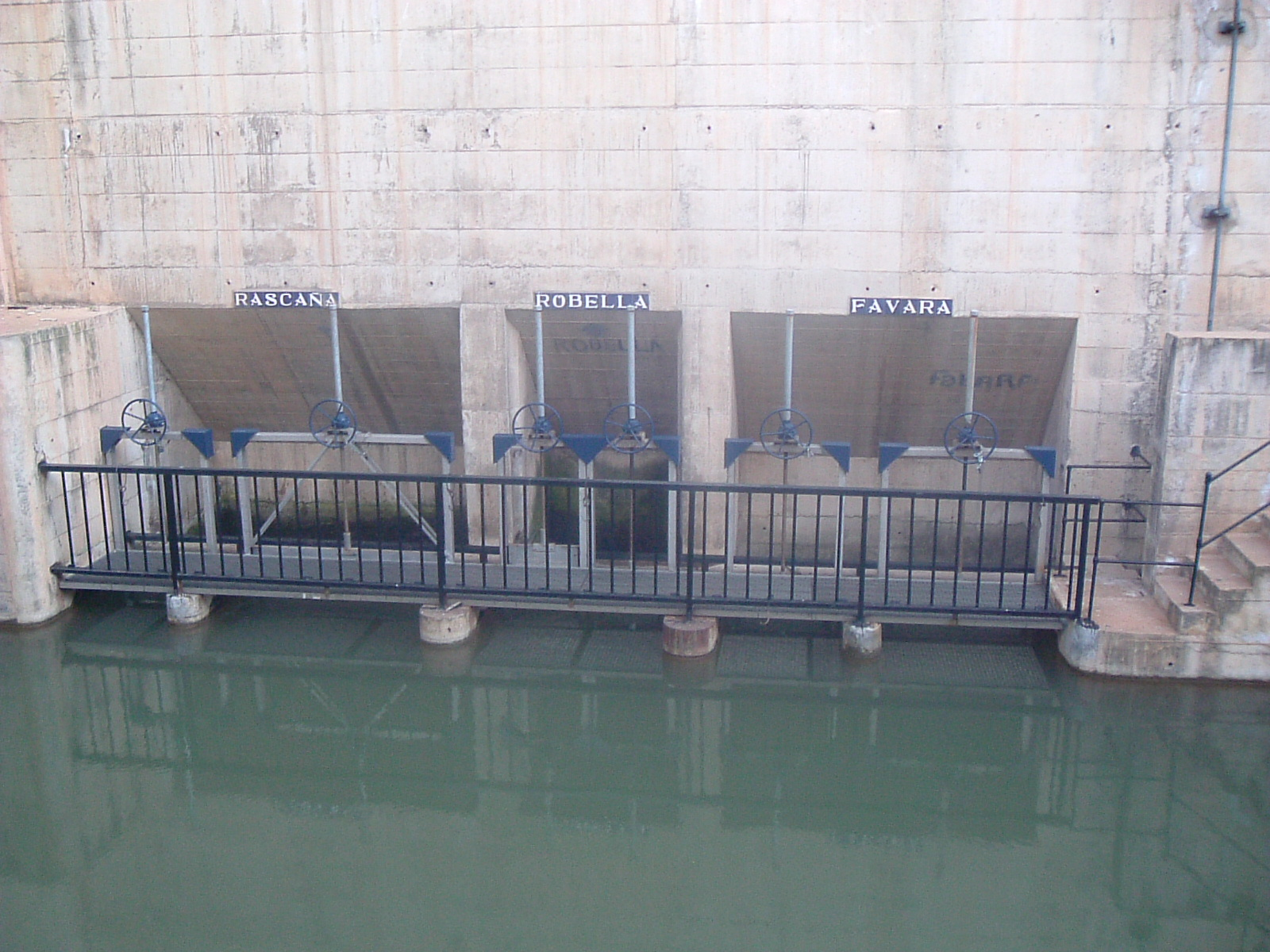 Tomas de las acequias de la margen izquierda en Azud del Repartiment